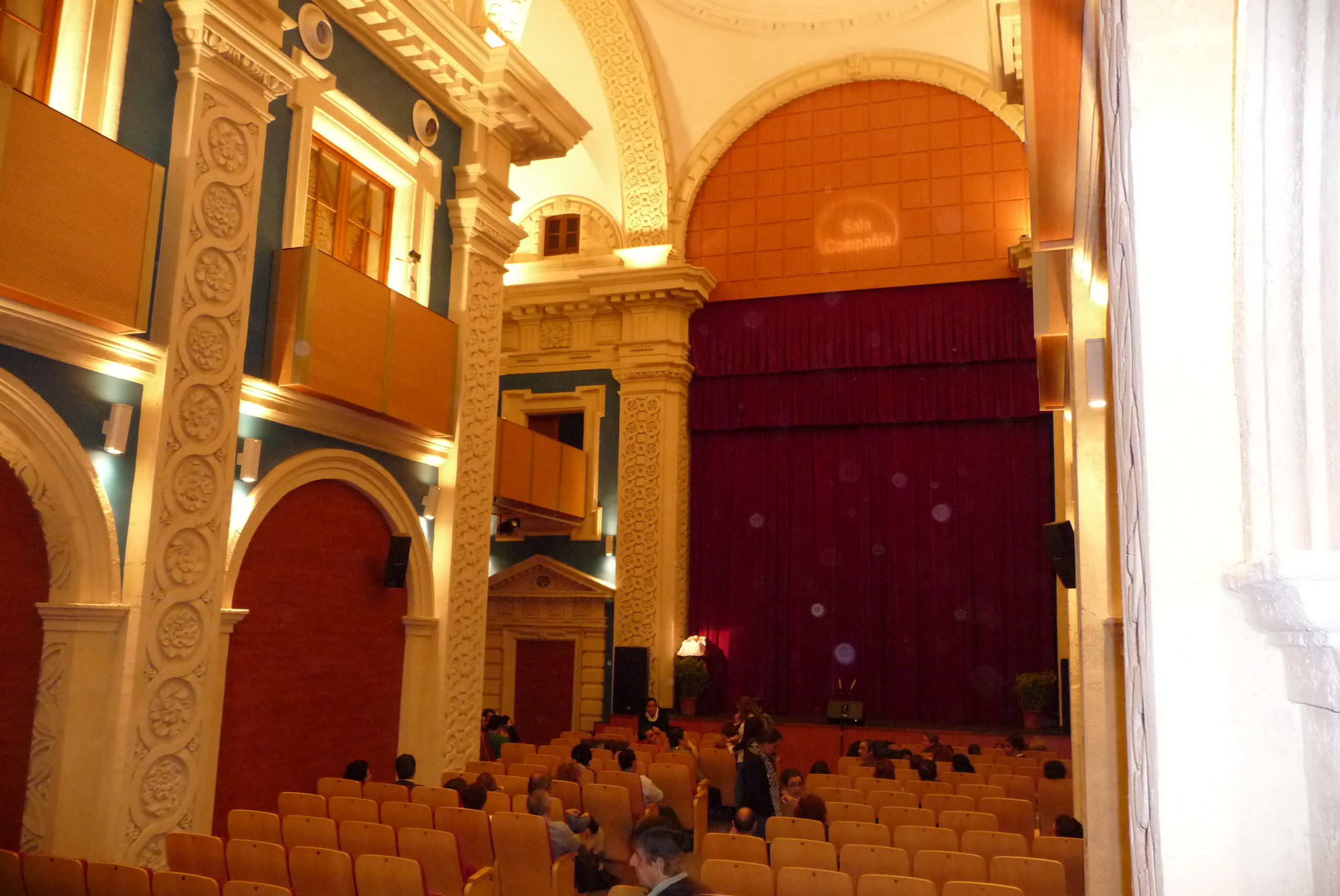 SalaCompannia-Jerez-p1010372.jpg